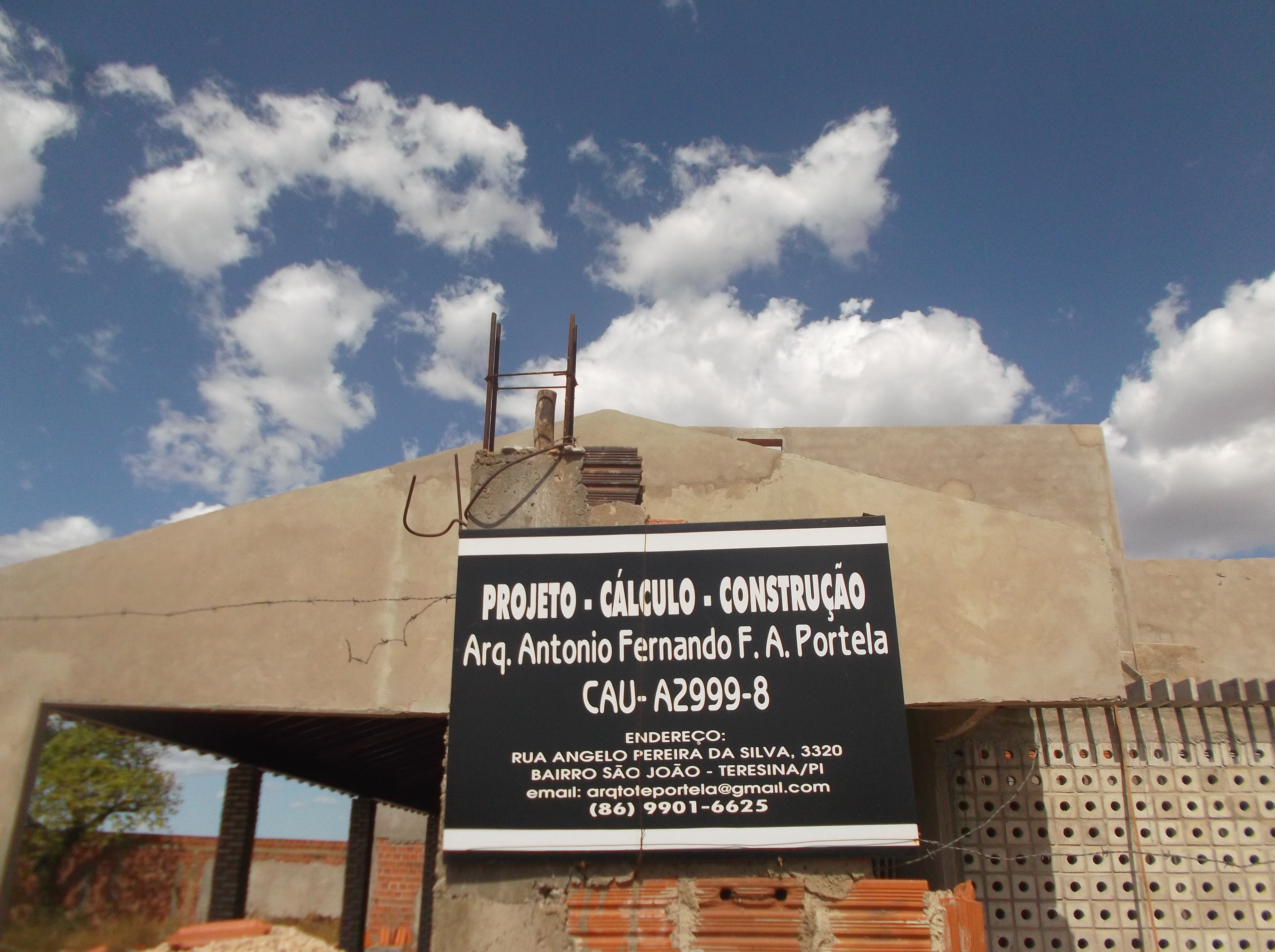 Placa de arquiteto, no Brasil, com a identificação do Conselho de Arquitetura e Urbanismo do Brasil.